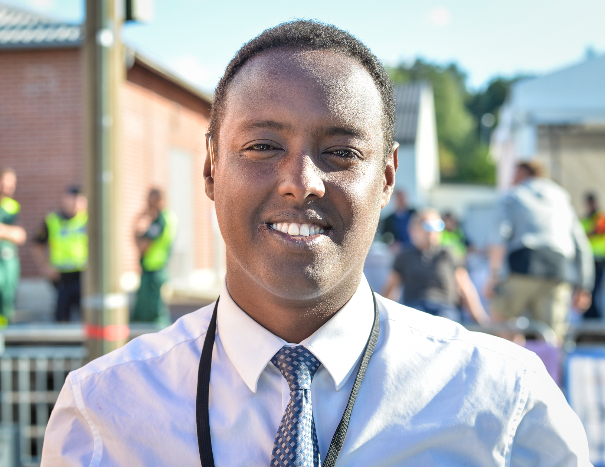 Ahmed Abdirahman under Järvaveckan 2018.